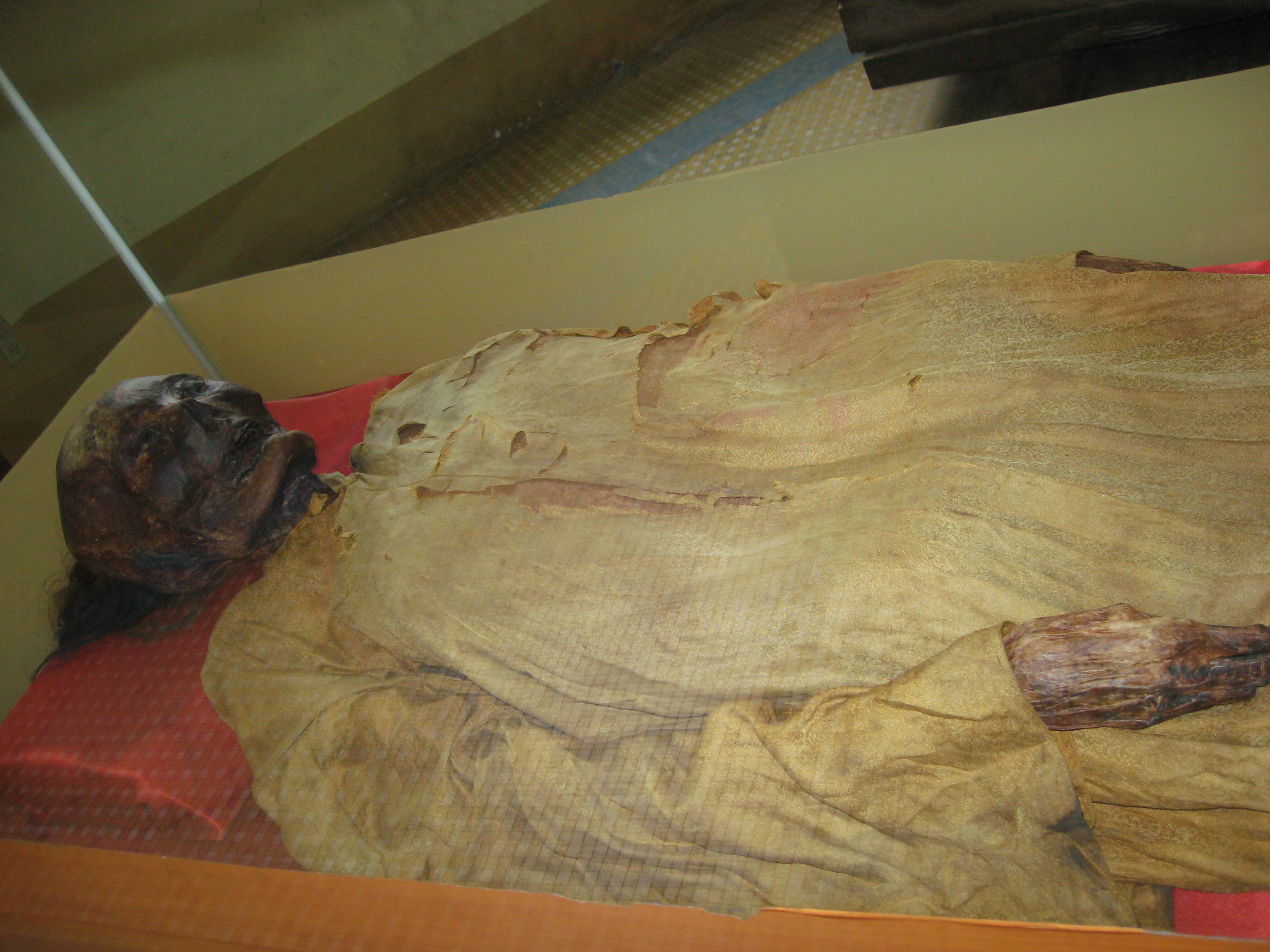 Momie de Xom Cai, Vietnam's History Museum in Ho Chi Minh City